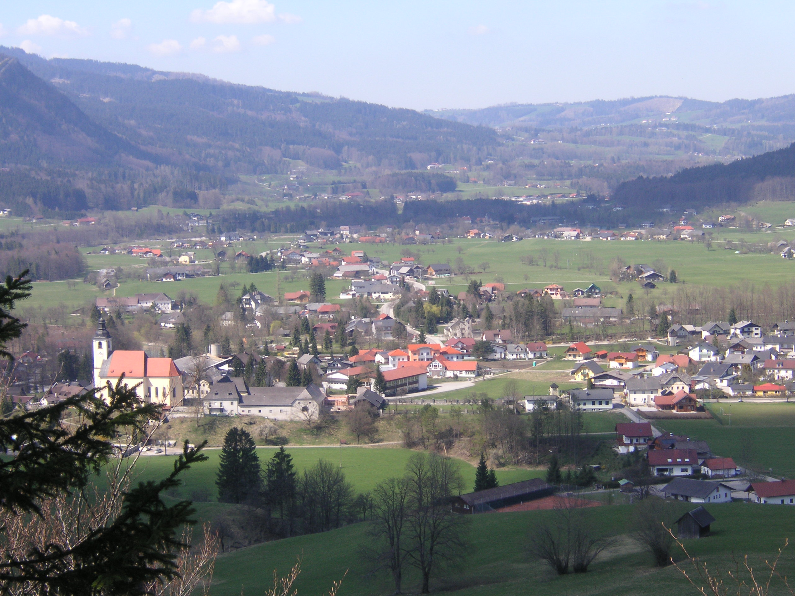 Ort Grünau